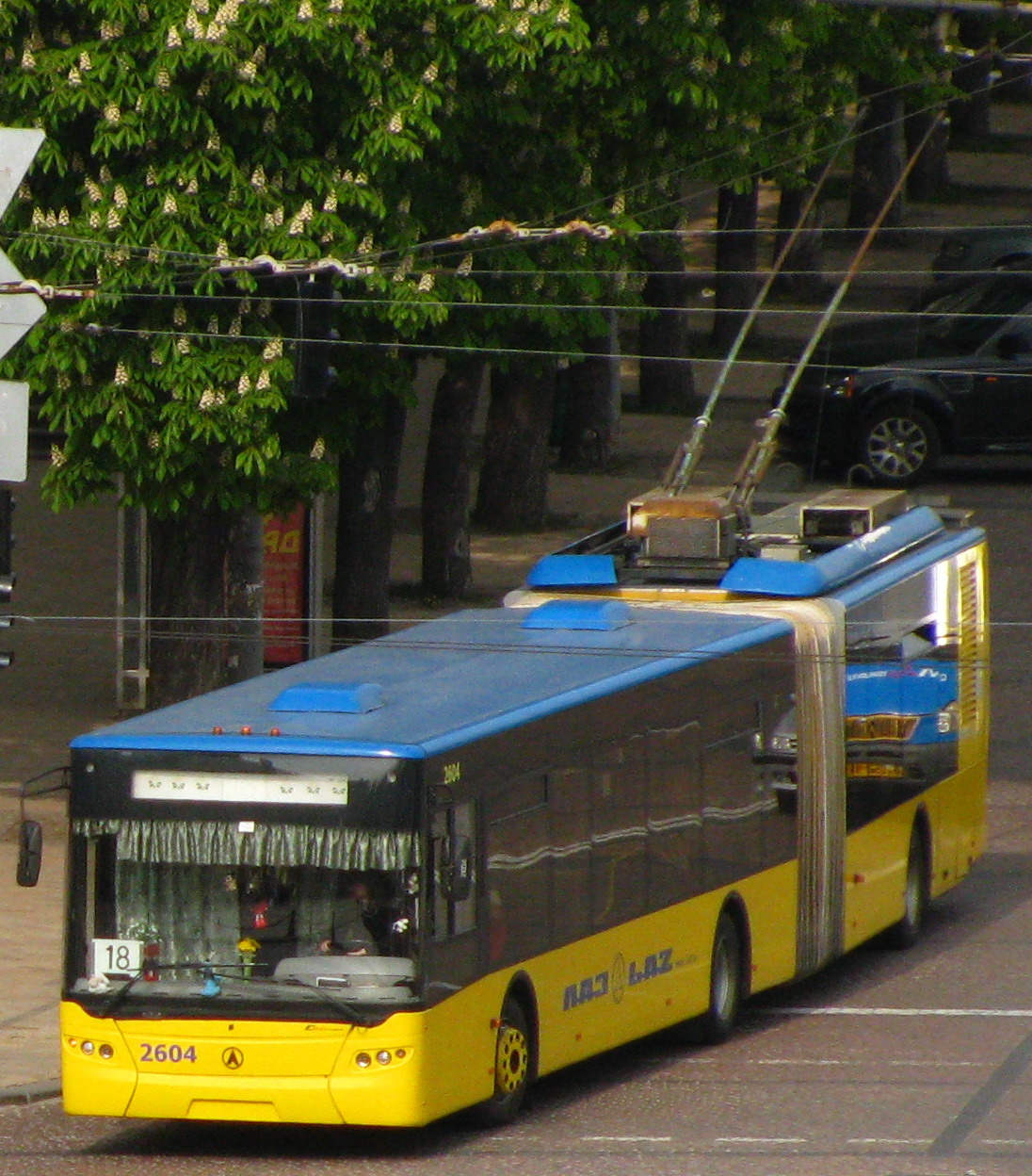 тролейбус ЕлектроЛАЗ-301 на Софійській площі у Києві. фото з дзвіниці